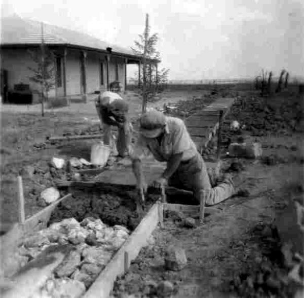 עד סלילת המדרכות הראשונות החברים בוססו בבוץ עד הברכיים.